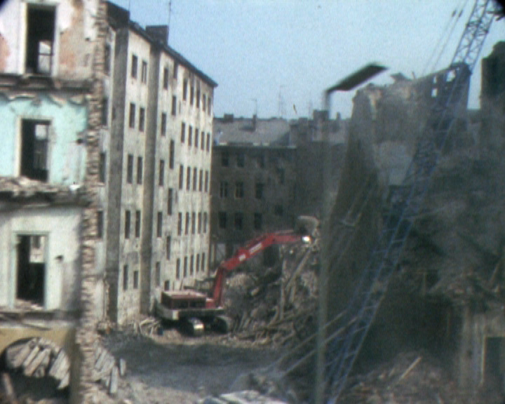 Der Block 104 bezeichnet einen Altbau-Komplex in Berlin-Kreuzberg. Er wurde bis 1981 zur Hälfte zerstört, der Rest blieb durch die Hausbesetzer-Bewegung erhalten. Abriss der Häuser an der Skalitzer Straße.